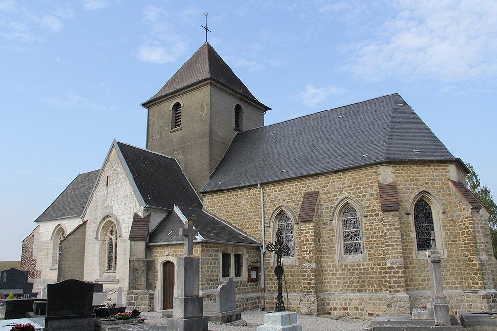 Verlincthun église